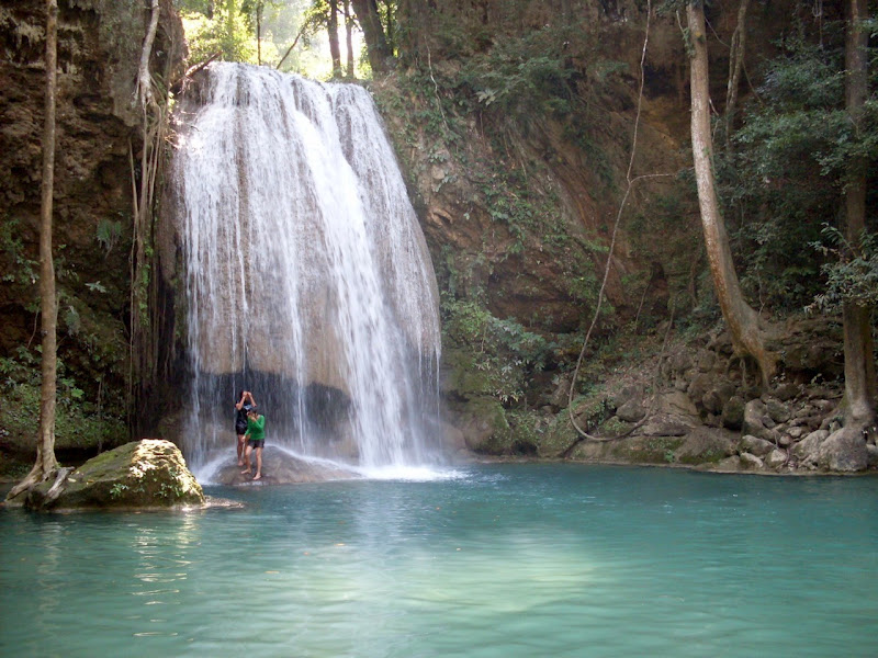 Kanchanaburi Erawan Selaleleri.